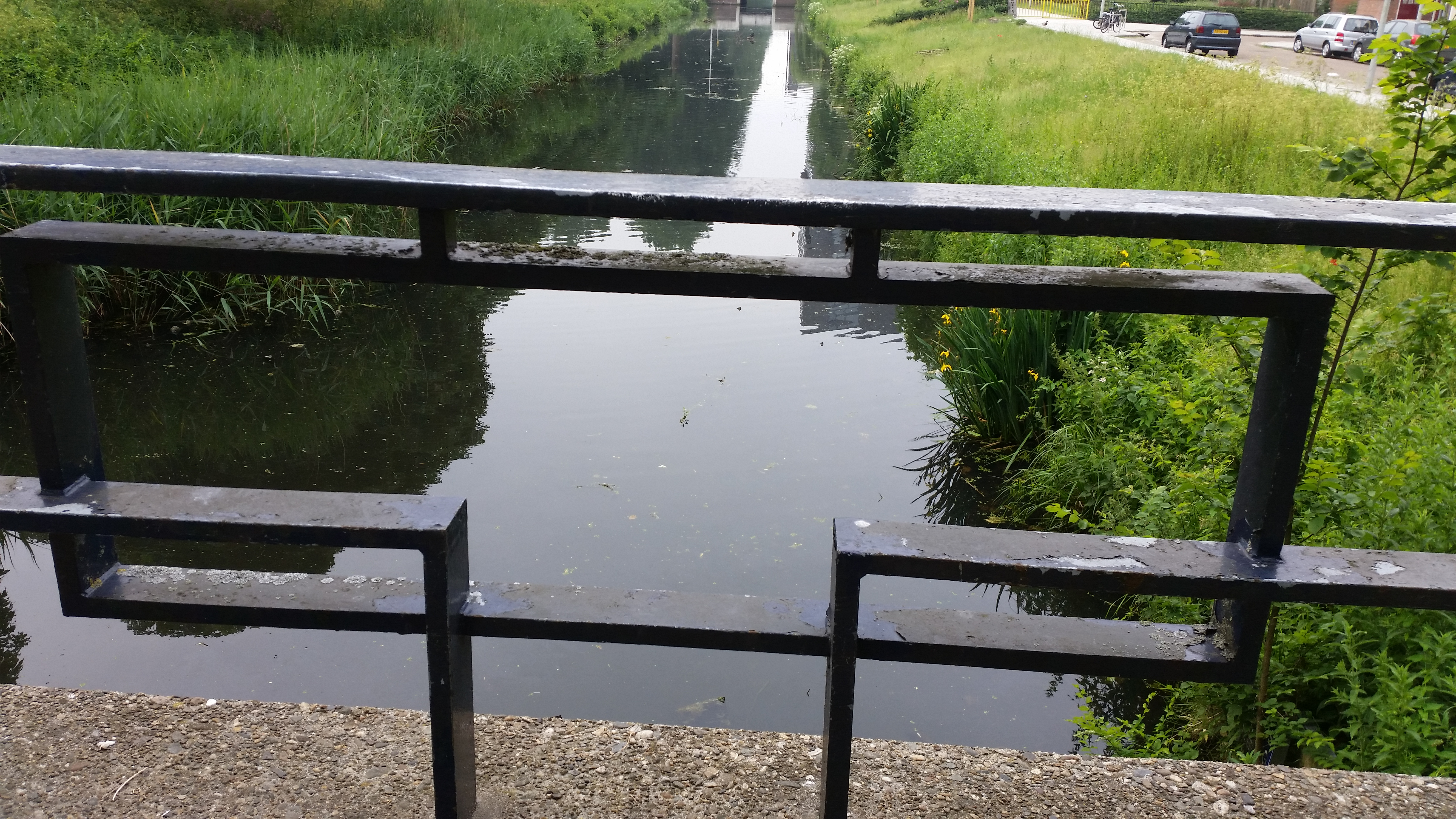 Brug 702 (in Amsterdam), detailfoto van leuning